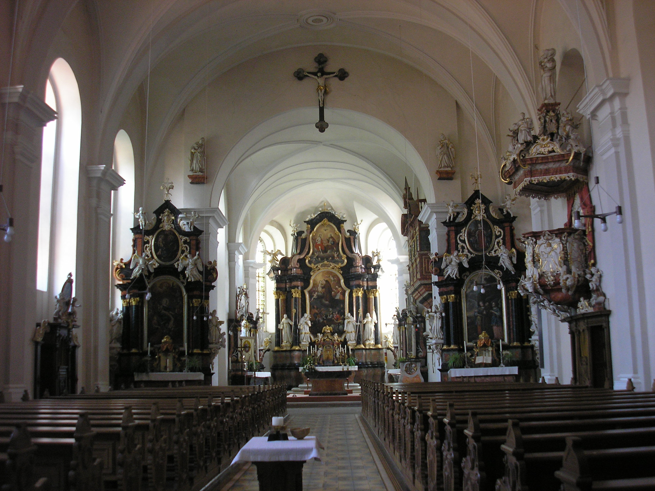 Das Innere der Klosterkirche in Worbis (Thüringen).